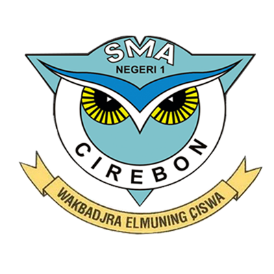 Logo Resmi